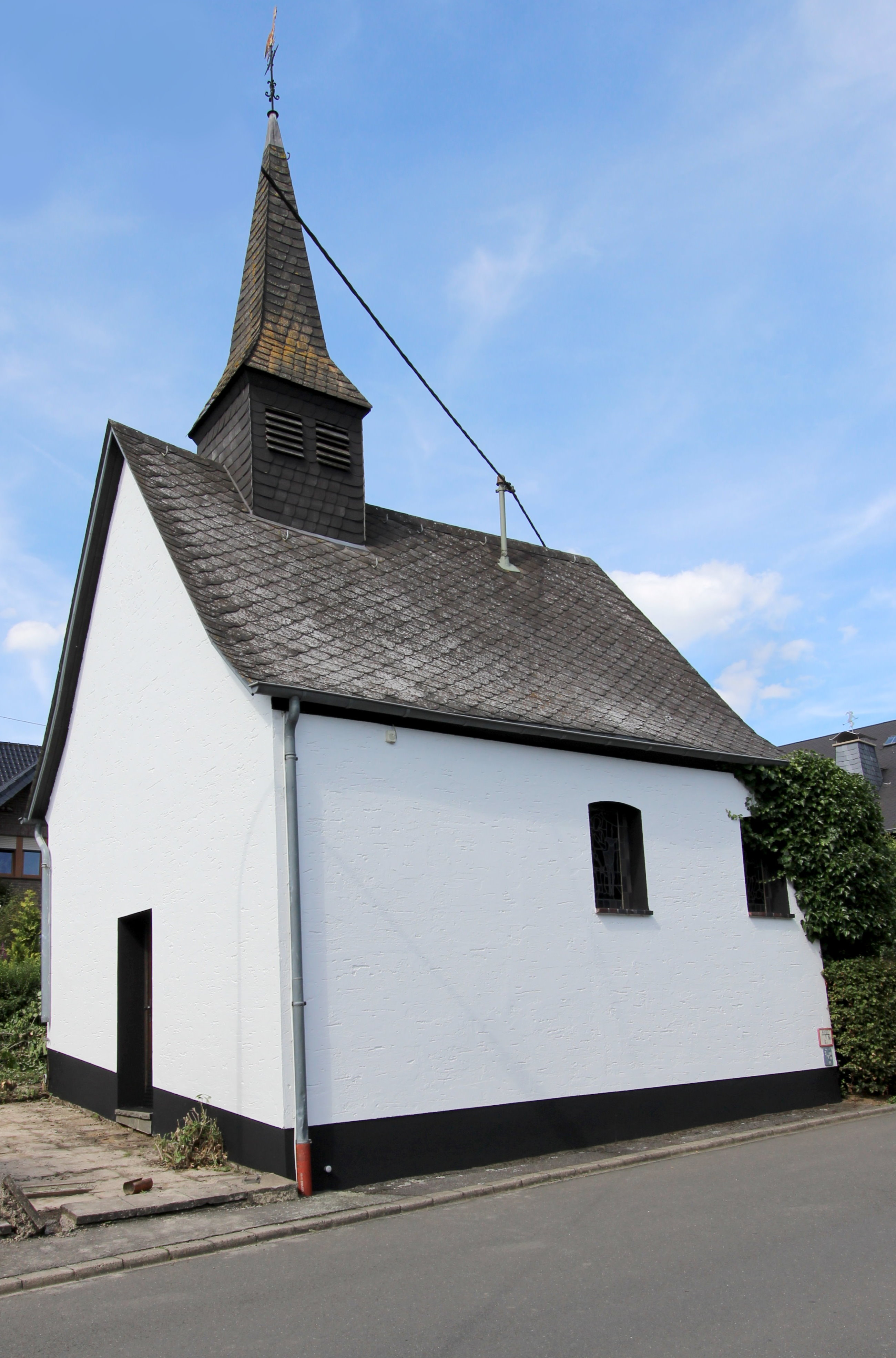 53520 Harscheid, Mittelstraße 4. Kapelle Sank Donatus. Saalbau, 1754. Aufnahme von 2017.